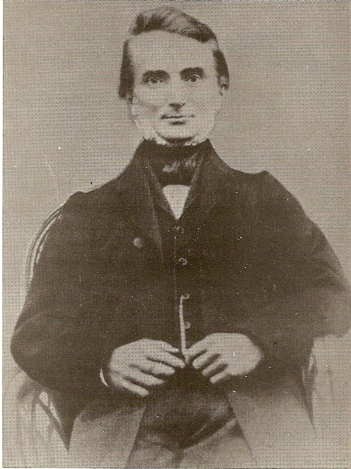 Porträtfoto des Apothekers Heinrich Joachim Versmann(1816-1866), Besitzer der Löwen-Apotheke in Lübeck.